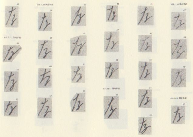 狭山事件の石川一雄が手紙で書いた「な」の文字写真。